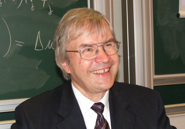 Own photo of Nobel-prize winner Theodor W. Hänsch Photo prise lors de la conférence "Passion for Precision", remake de celle donnée à Stockholm pour sa réception du prix Nobel de physique 2005, donnée le 20 octobre 2006 à l'Ecole Polytechnique.